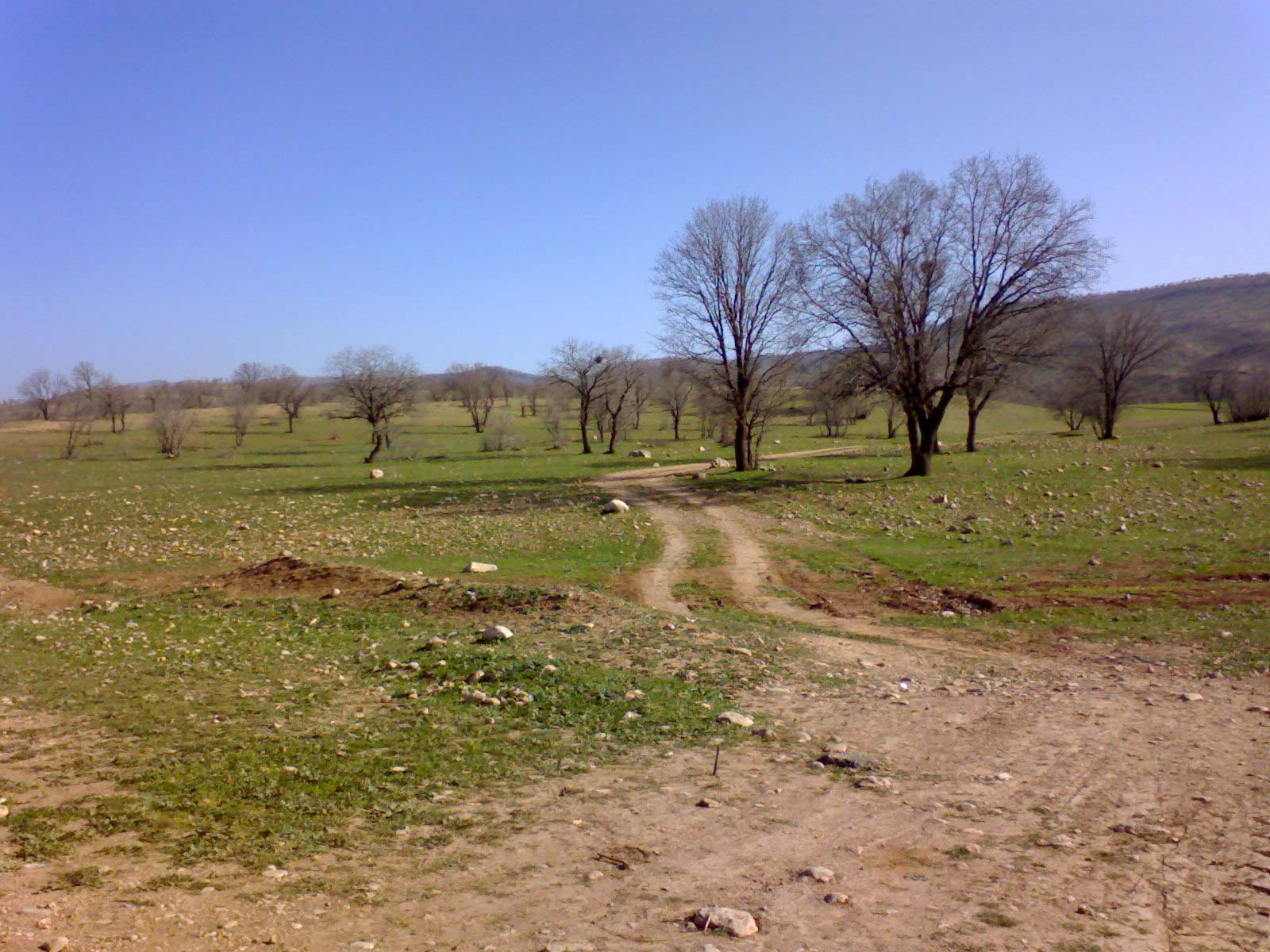 عکاس : میثم ابراهیمی